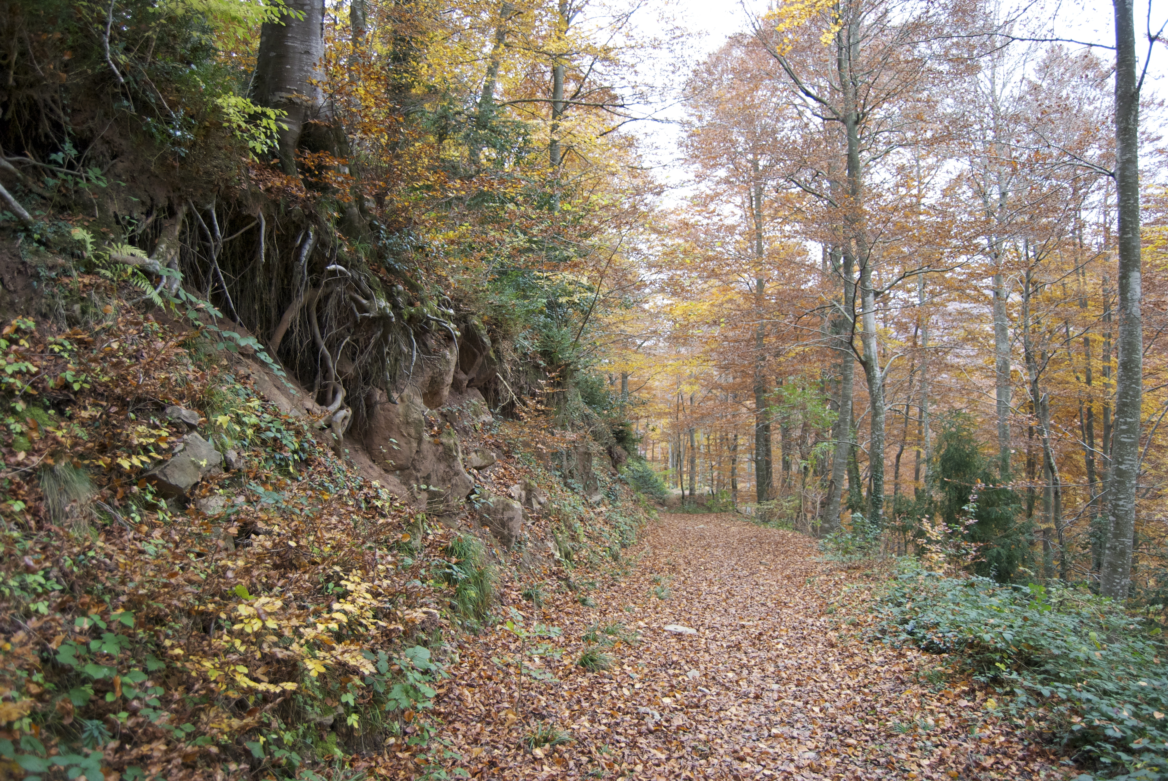 Serres de Milany-Santa Magdalena i Puigsacalm-Bellmunt This is a a photo of a natural area in Catalonia, Spain, with id: ES510199